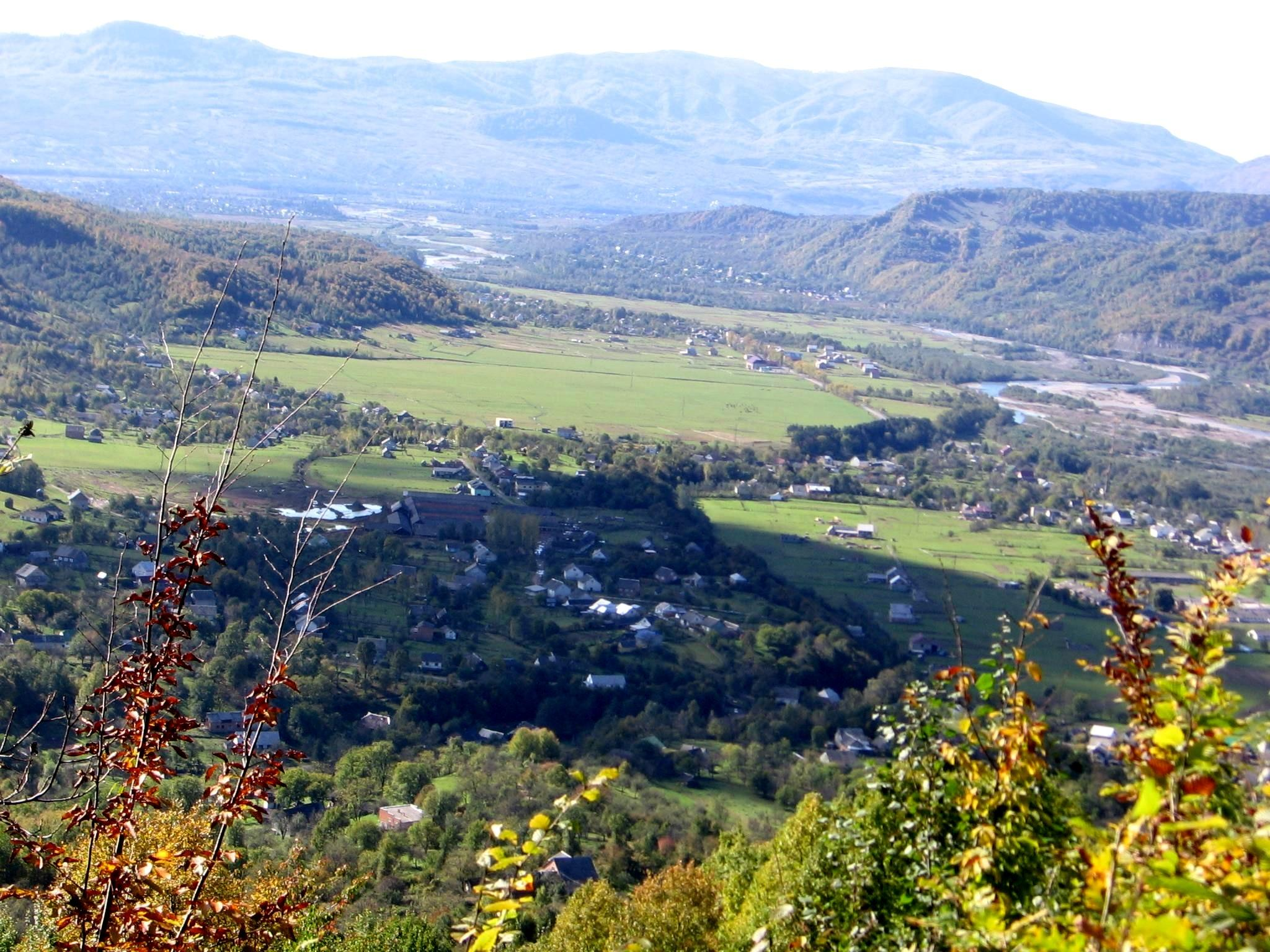 р. Тересва (Закарпаття)